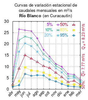 Curvas de variación estacional del río Blanco en Curacautín. # Dirección General de Aguas # Diagnóstico y clasificación de los cursos y cuerpos de agua según objetivos de calidad. Cuenca del río Imperial. # Santiago de Chile # Ministerio de Obras Públicas (Chile) # 2004 # url: # urlarchivo: # Tabla 4.8: Río Blanco en Curacautín (m3/s), pág. 53 mes 5% 10% 20% 50% 85% 95% abr 6.266 4.743 3.456 2.05 1.298 1.092 may 26.521 21.647 16.566 9.15 3.621 1.838 jun 26.124 23.413 20.35 15.11 9.625 6.835 jul 25.663 22.557 19.116 13.508 8.267 5.963 ago 22.522 19.633 16.62 12.069 8.027 6.193 sep 17.449 15.436 13.337 10.167 7.351 6.074 oct 14.55 13.419 12.049 9.43 6.204 4.309 nov 11.201 10.343 9.304 7.317 4.871 3.434 dic 10.006 8.806 7.495 5.367 3.307 2.329 ene 6.842 5.756 4.668 3.128 1.91 1.43 feb 6.464 5.871 5.153 3.779 2.088 1.094 mar 4.163 3.601 3.016 2.132 1.347 0.99 This plot was created with Gnuplot.